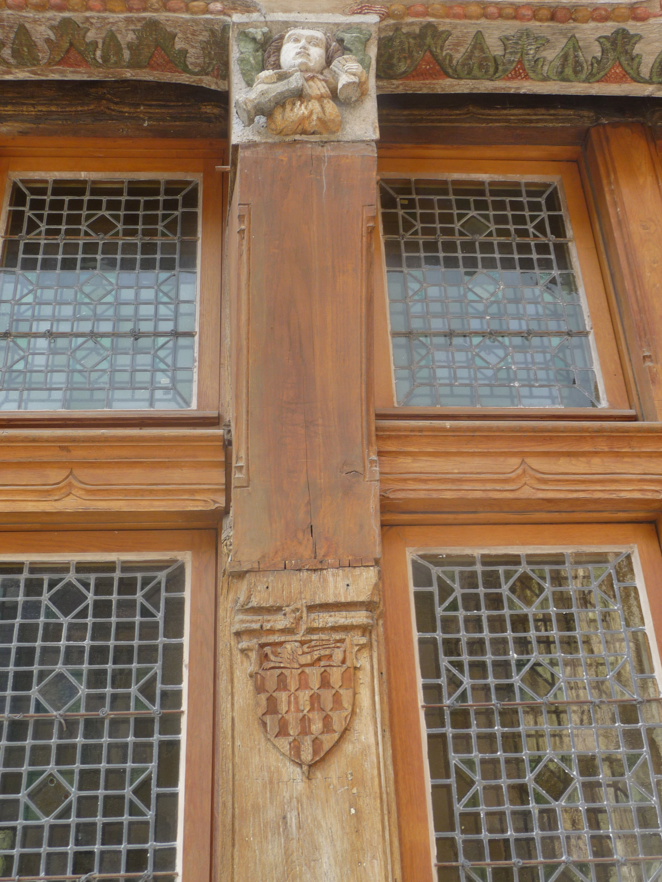 La cour. Ancienne maison du chapitre de la cathédrale, devenue relais de poste jusqu'au début du XIXe siècle .